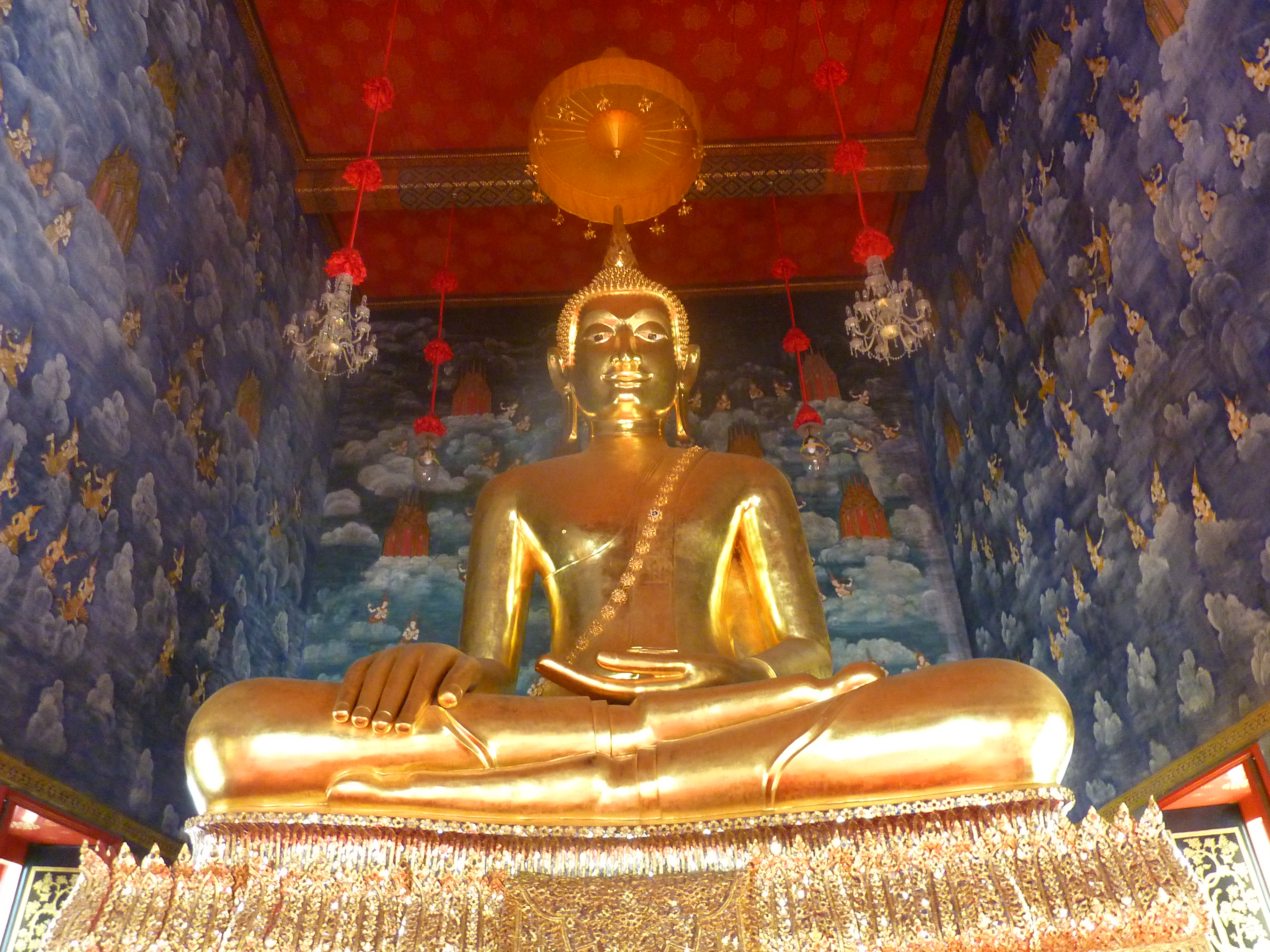 Wat Rachatiwat, Bangkok